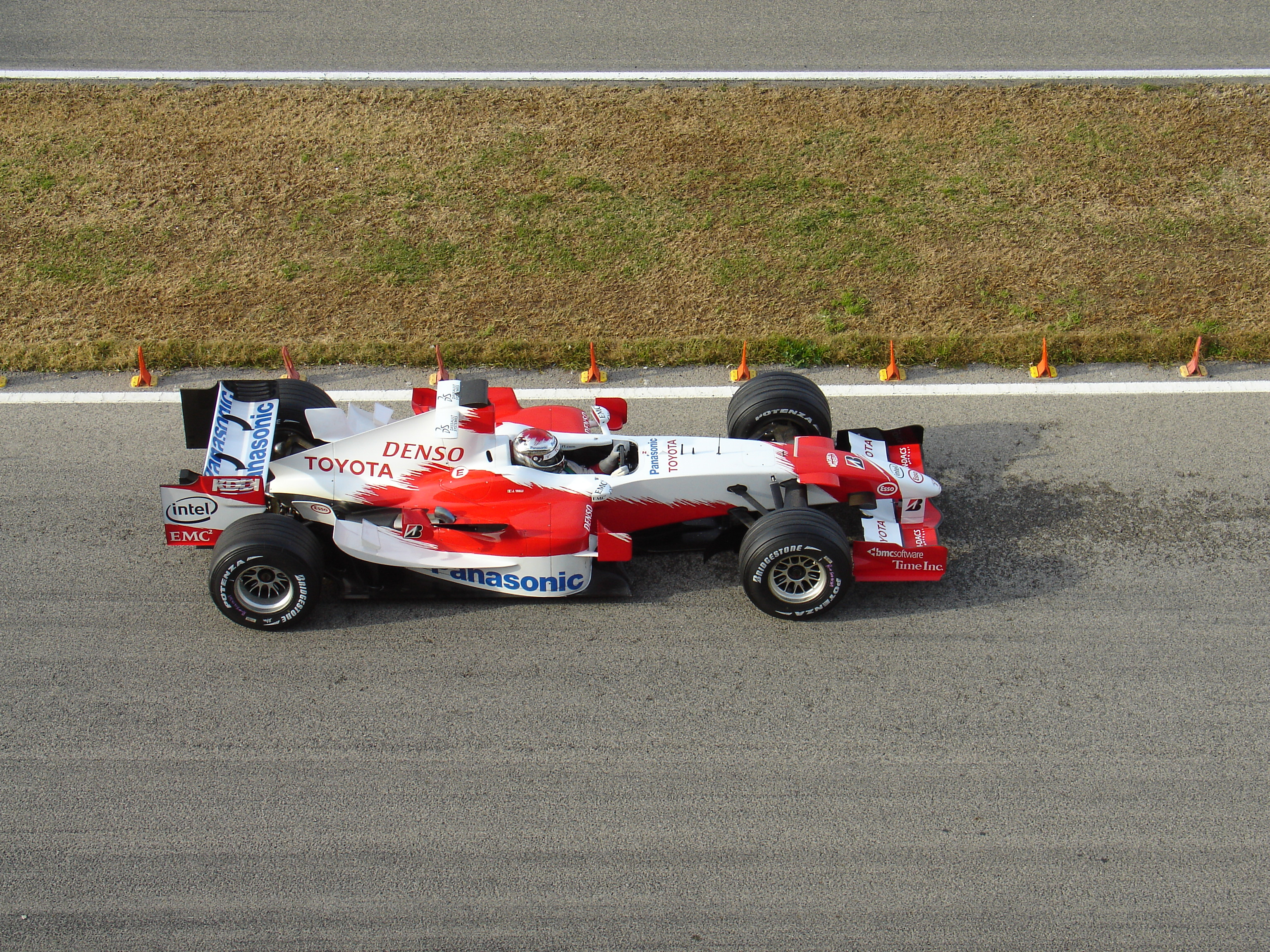 Jarno Trulli at Cheste Circuit (Valencia)